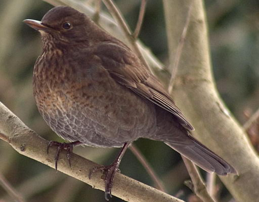 Turdus merula (female) Photo taken in Rumia, Poland by Adam Kumiszcza.